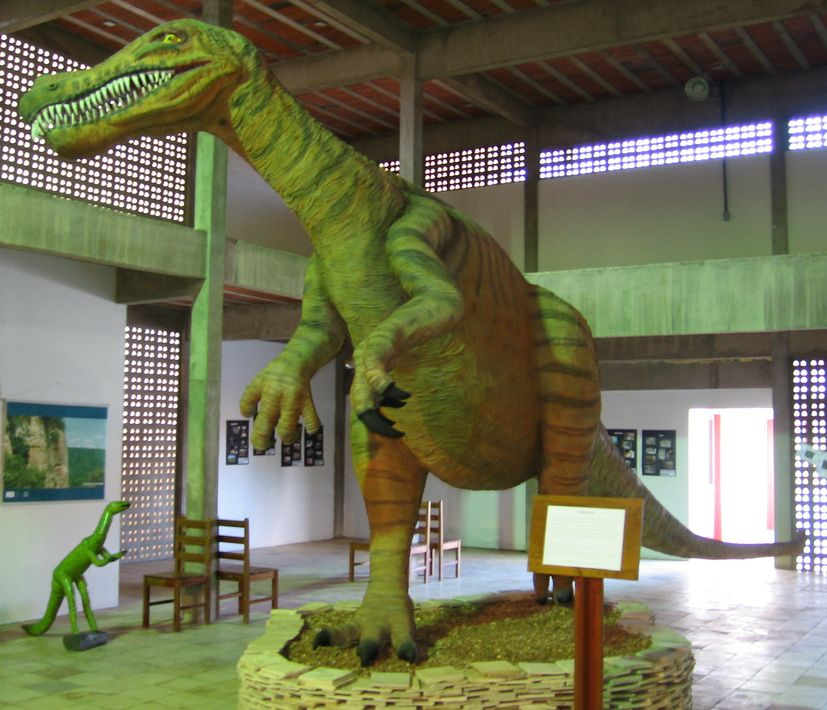 Representação do Angaturama limai no Museu de Paleontologia da URCA, localizado em Santana do Cariri, pequeno município ao Sul do Estado do Ceará no Brasil.